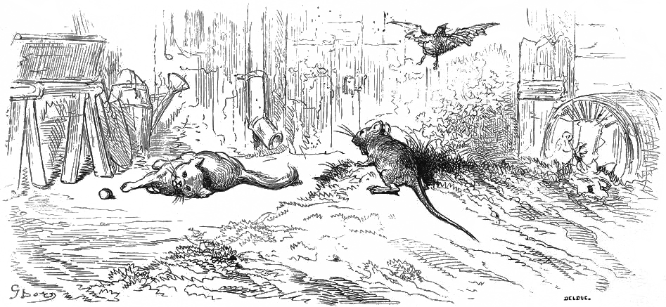 grafika z książki PL Bajki, Jean de La Fontaine, nakładem i drukiem Jana Noskowskiego, Warszawa 1876